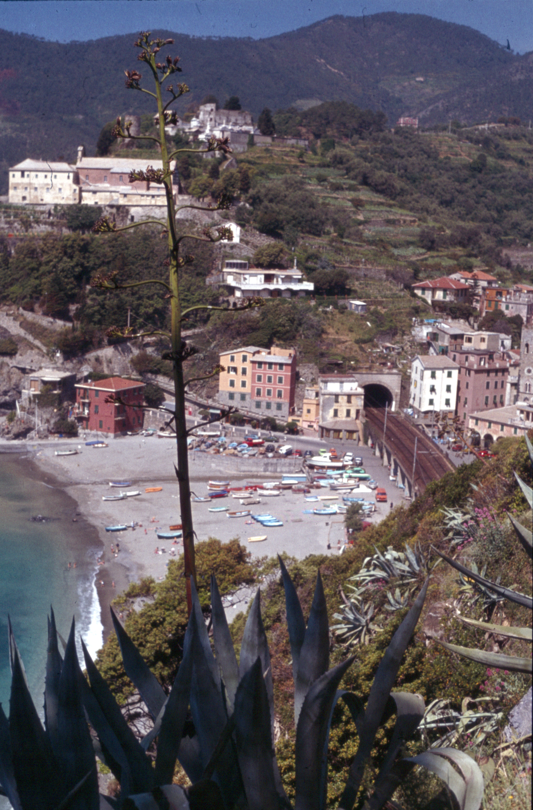 Monterosso al Mare